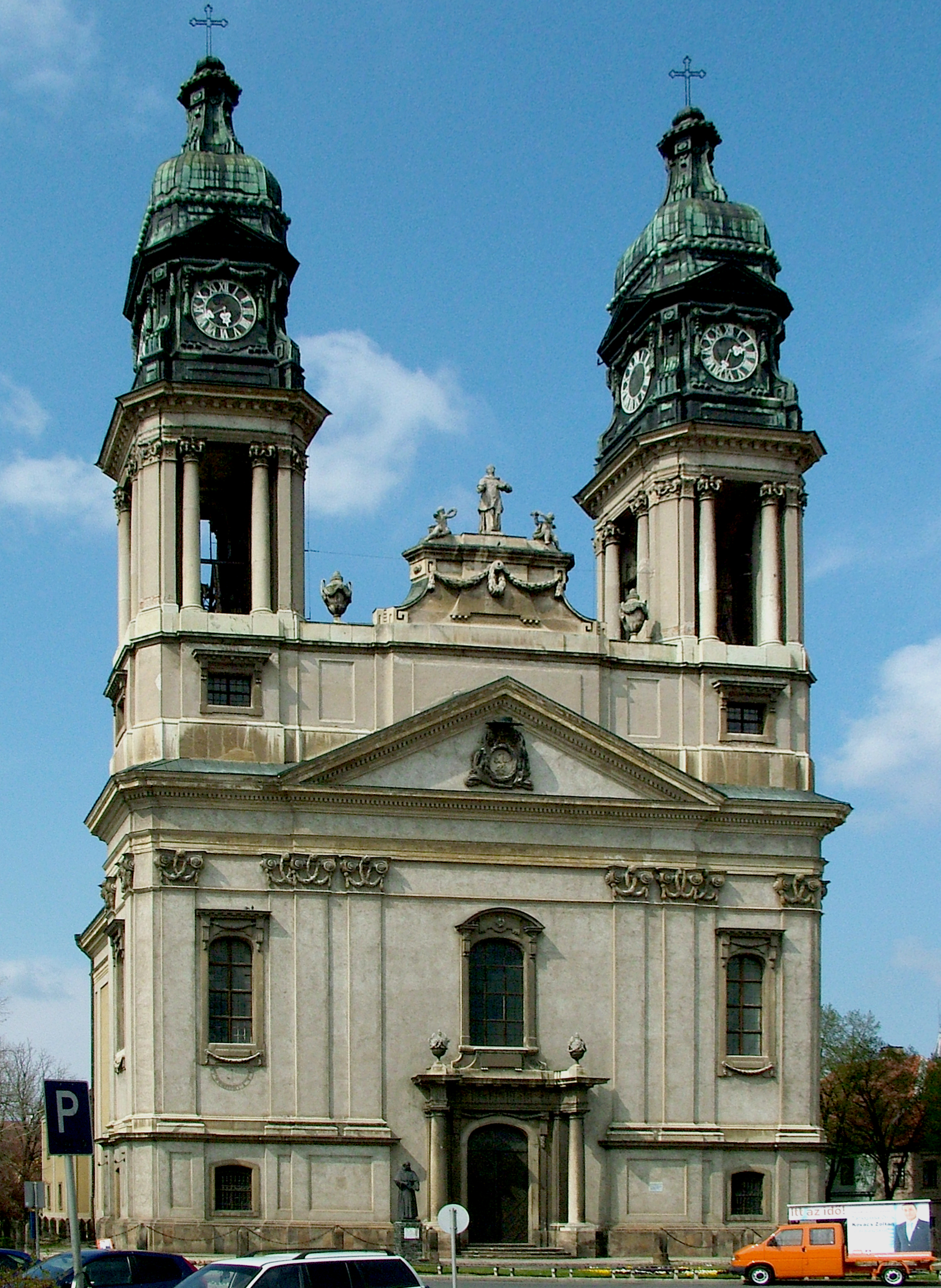 Pápa Szent István vértanú nagytemplom. Főhomlokzat